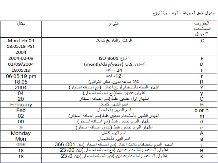 تحويلات الوقت والتاريخ